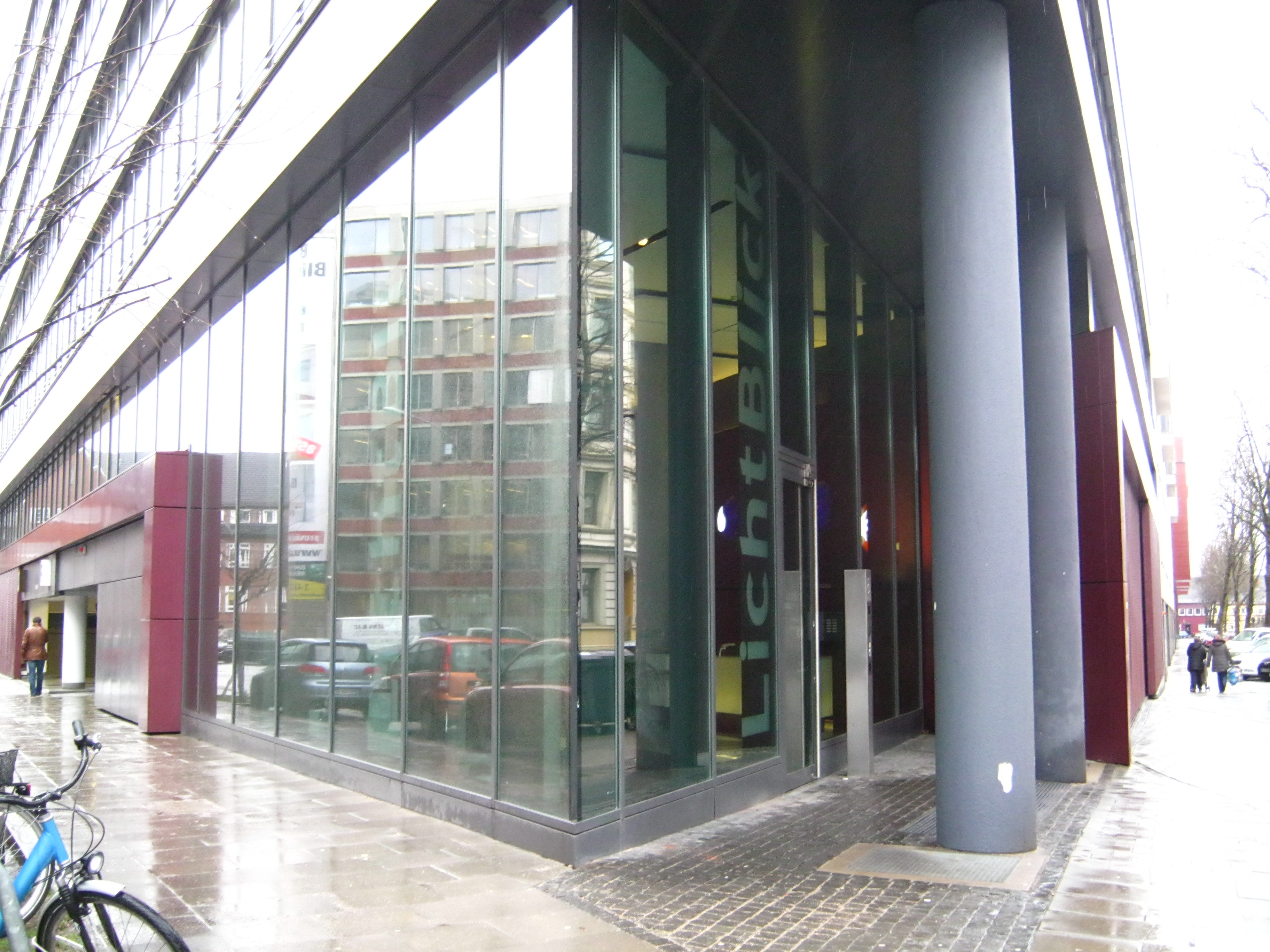 Eingang der Fa. Lichtblick AG in Hamburg.